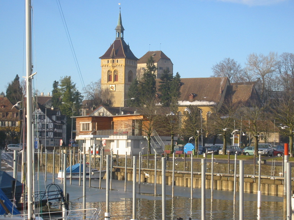 Katholische Kirche St. Martin in Arbon mit Hafen im Vorder- und Schlossturm im Hintergrund